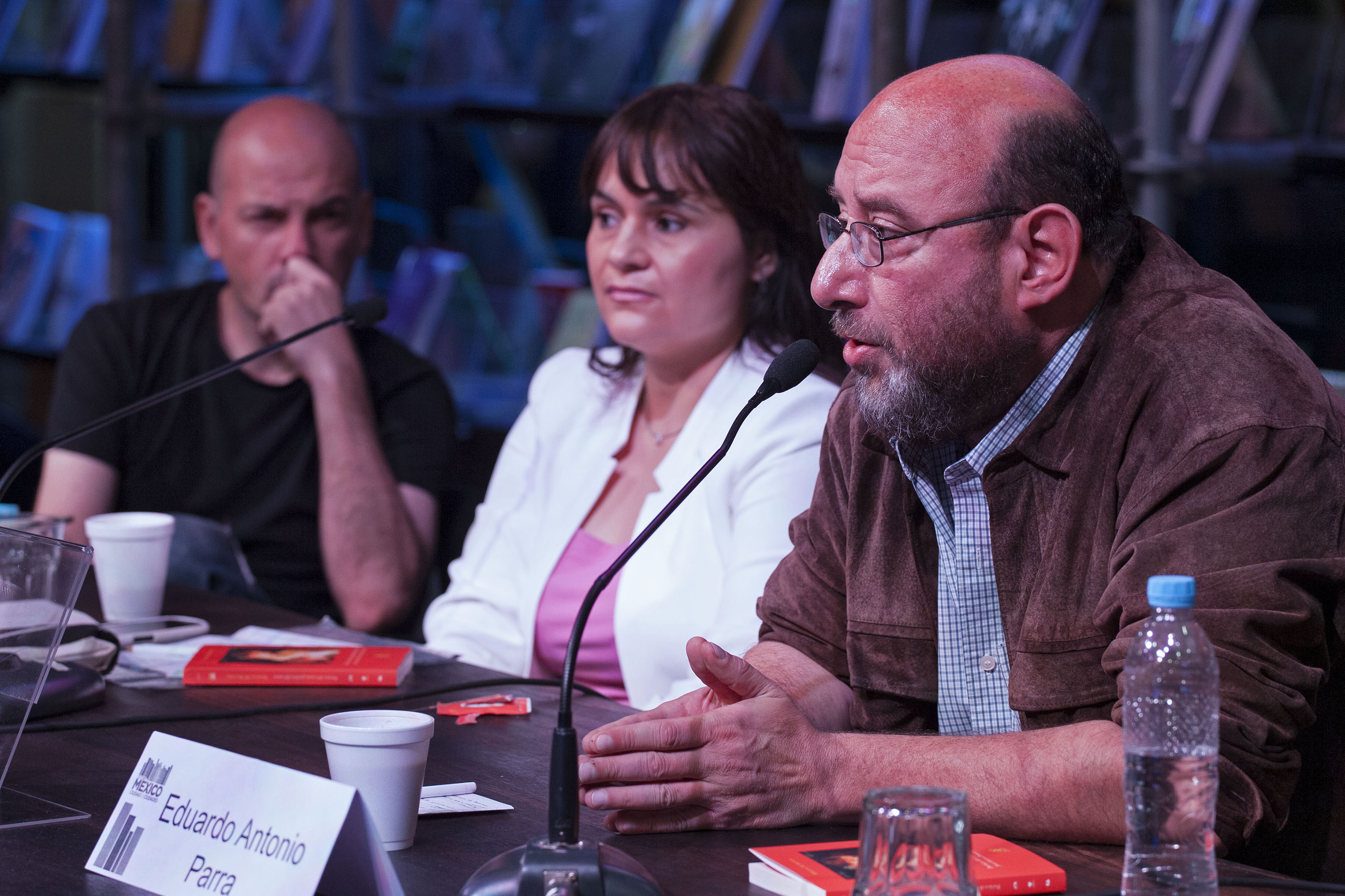 Sábado, 2 de Mayo 2015. En el marco de la 41a Feria Internacional del Libro de Buenos Aires se presentó el libro Poética del Voyeur, poética del amor. Juan García Ponce e Inés Arredondo, edición Conaculta-INBA-Instituto de Cultura del Estado de Durango, con su autora Maritza M. Buendía y los escritores Matías Alinovi y Eduardo Antonio Parra, en el Stand de la Ciudad de México. Foto: Antonio Nava / Secretaria de Cultura Ciudad de México.